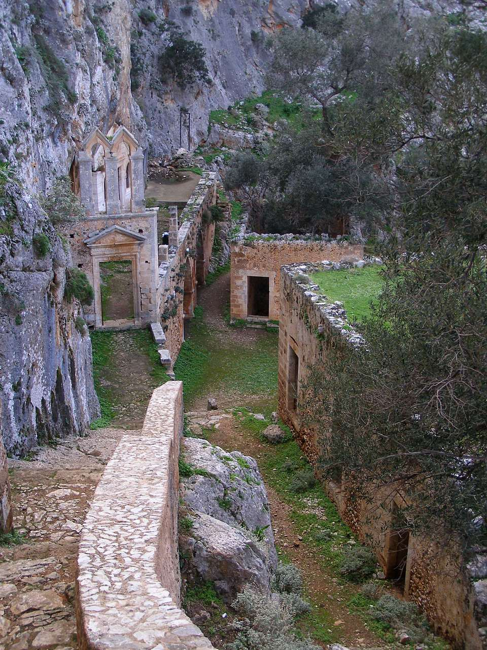 Kloster Katholiko, Akrotiri, Kreta